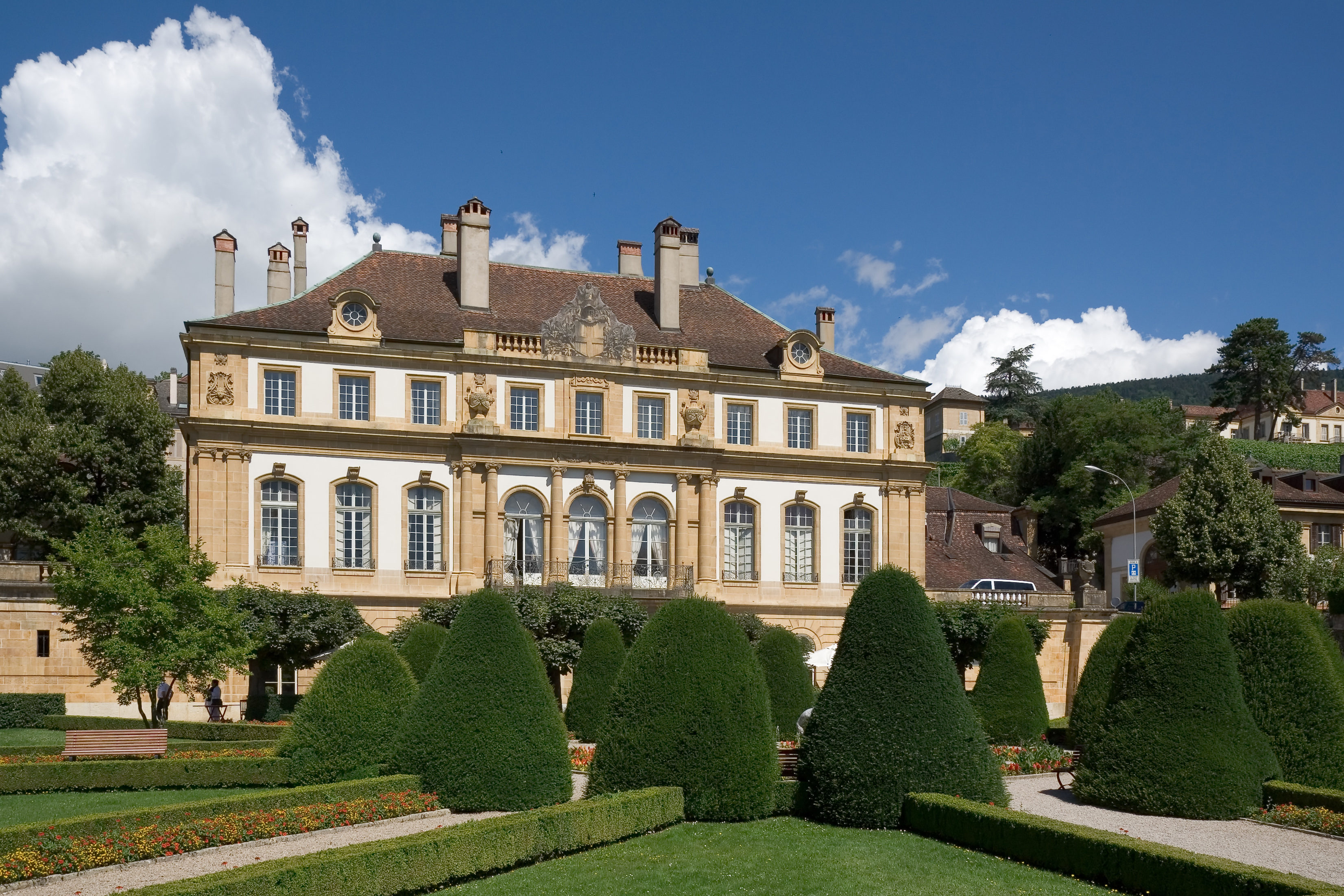 Das Hôtel du Peyrou in Neuenburg, Schweiz